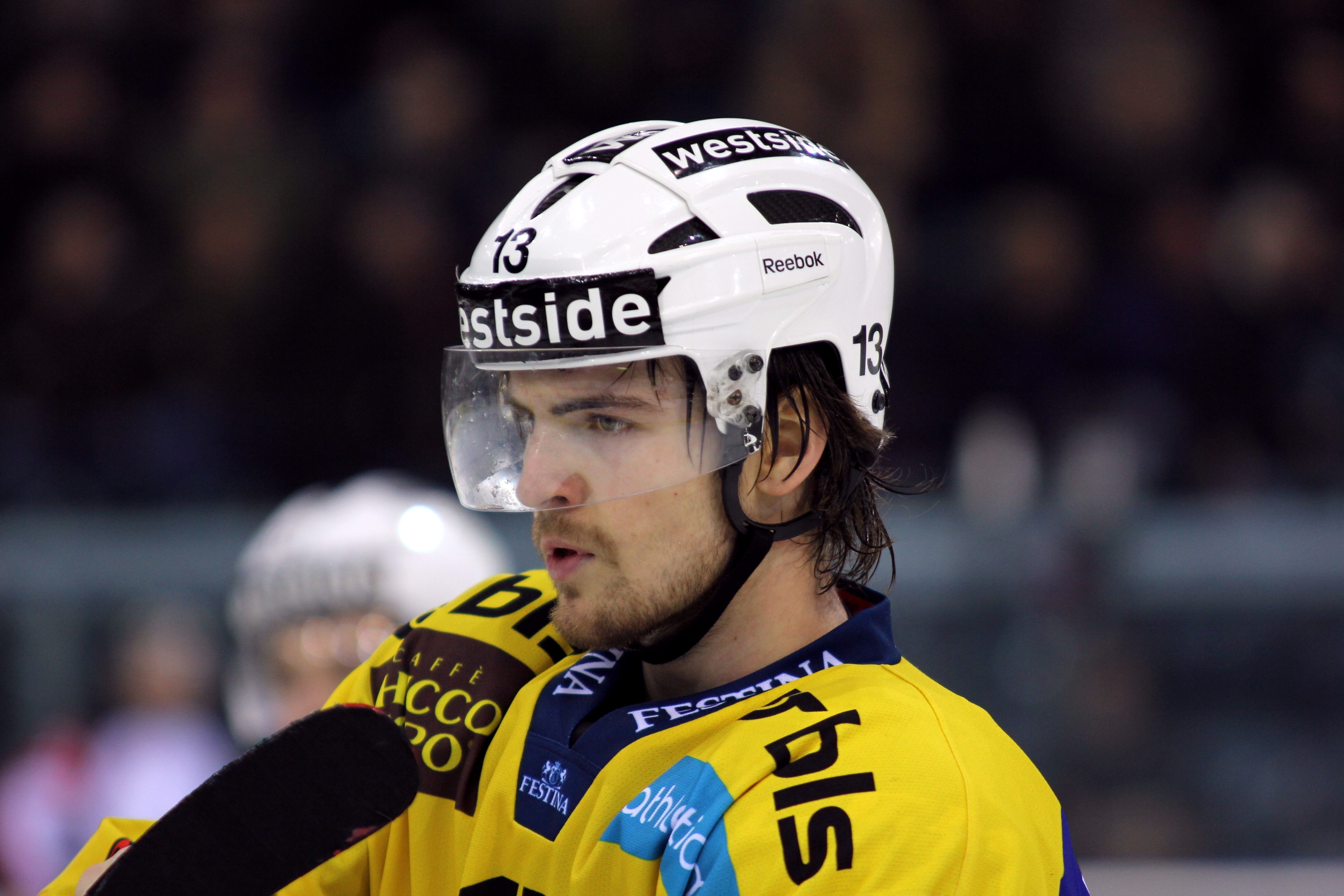 Luca Hischier (B 13).